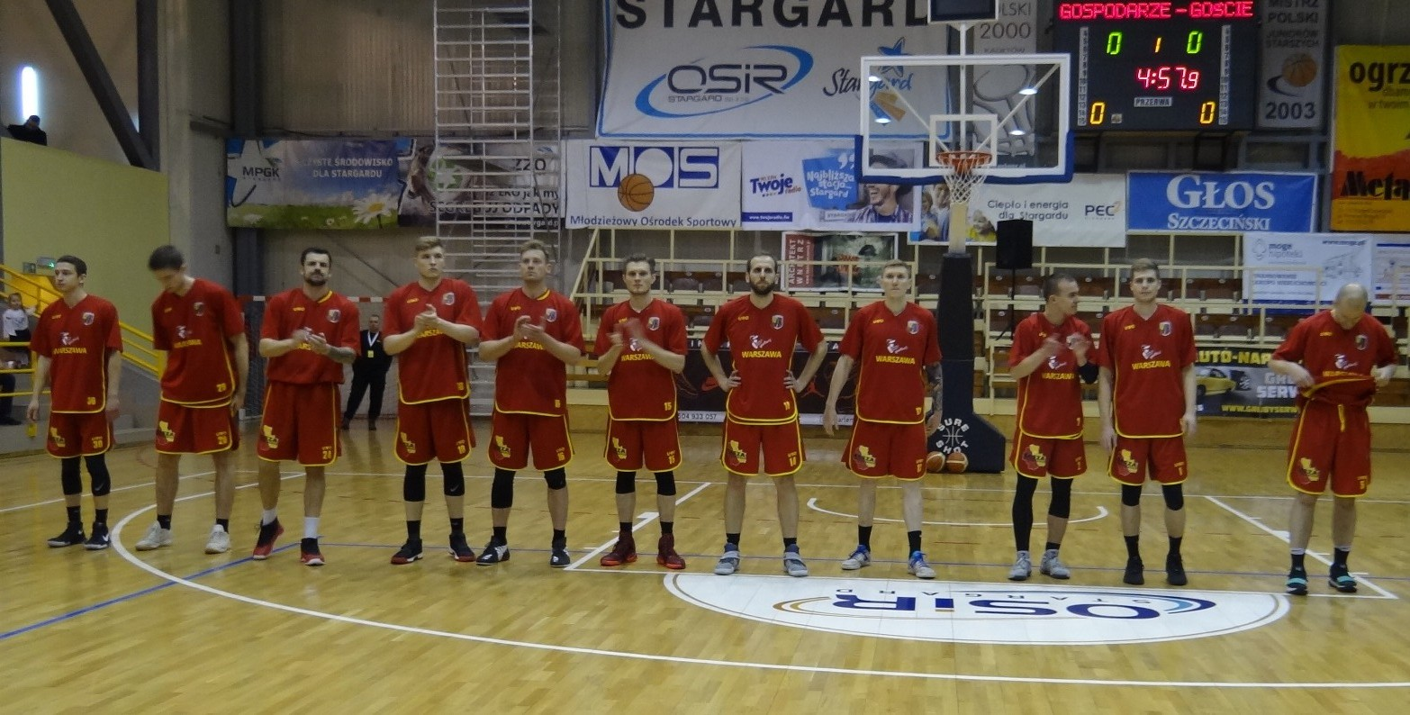 Zespół KK Warszawa